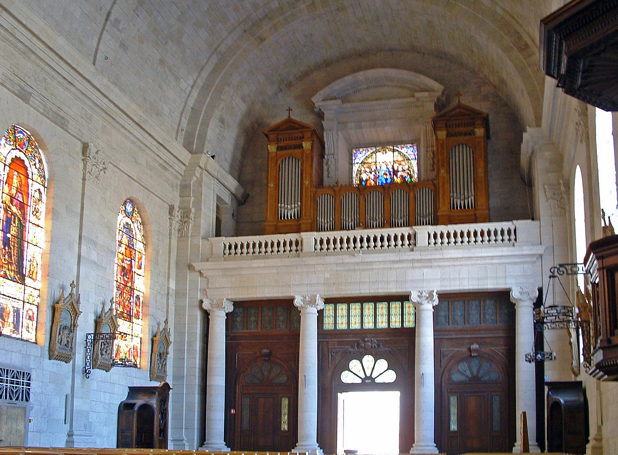 Nérac - Eglise Saint-Nicolas - Tribune et orgue